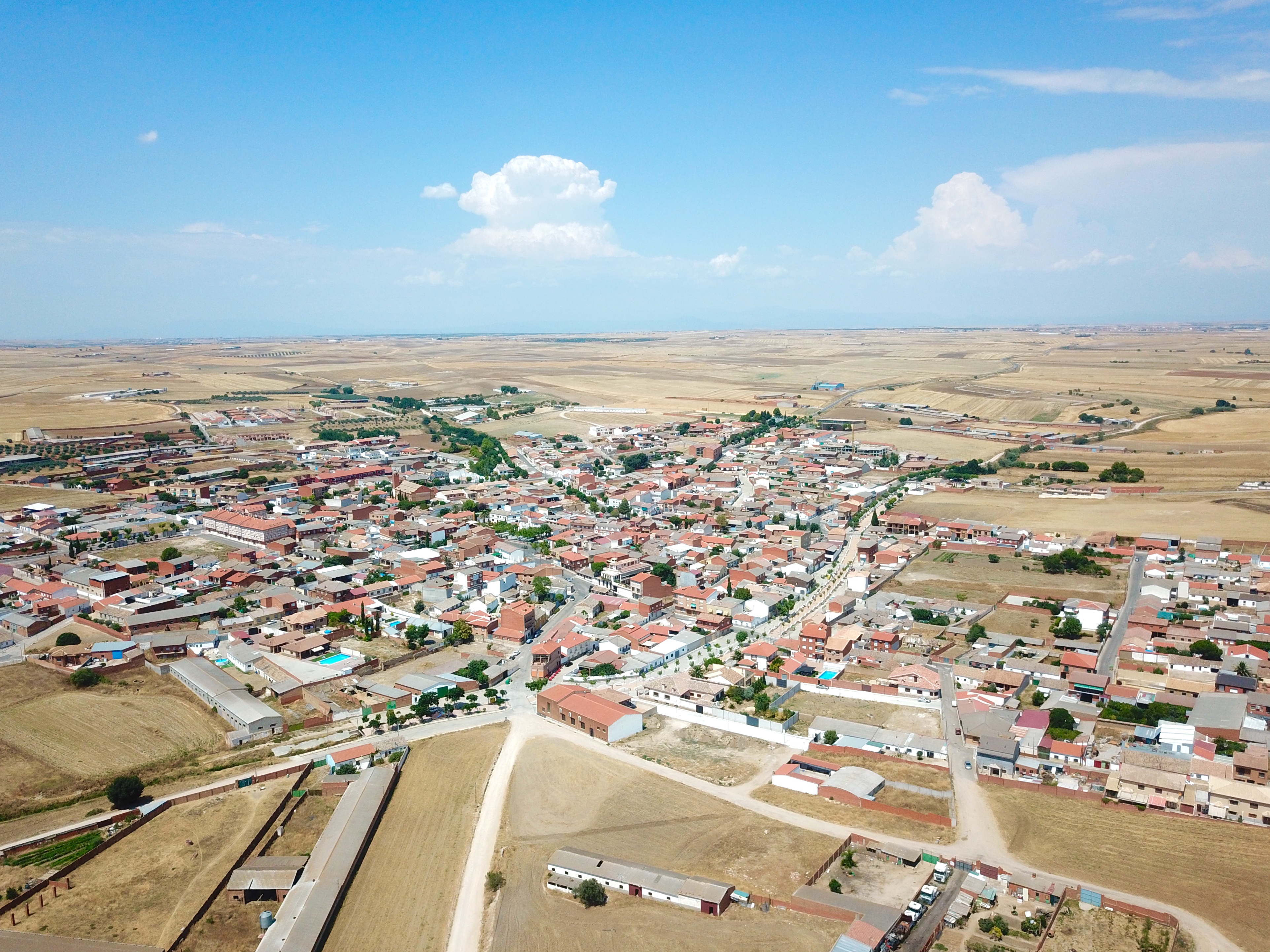 Fotografía tomada con drone en area LER43 de acuerdo a las indicaciones de vuelo de esta zona y respetando la legislación aplicable a este tipo de aeronaves en la fecha en la que se ha realizado la toma.